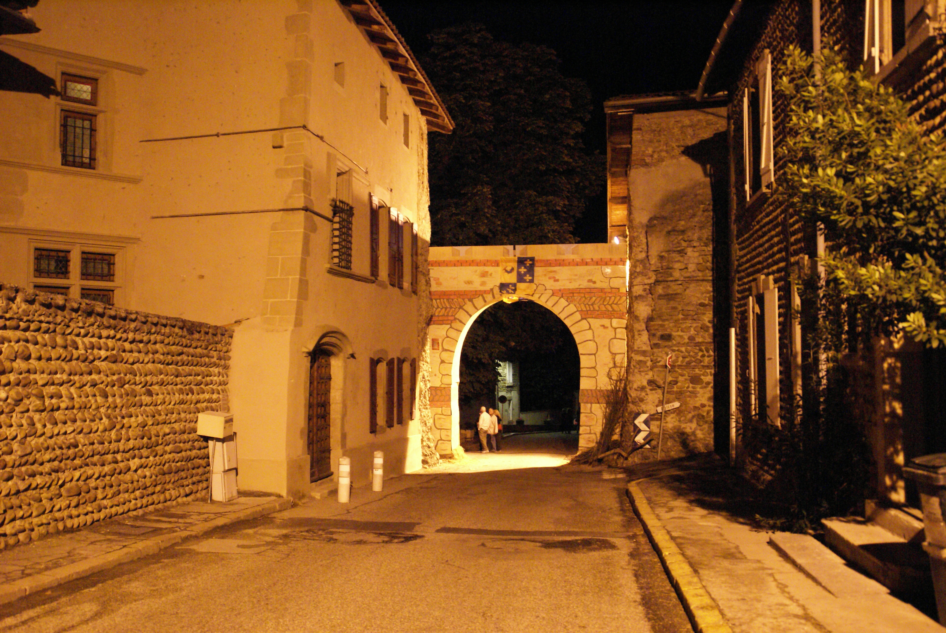 Porte médiévale reconstituée à l'occasion des festivités du millénaire de Moras